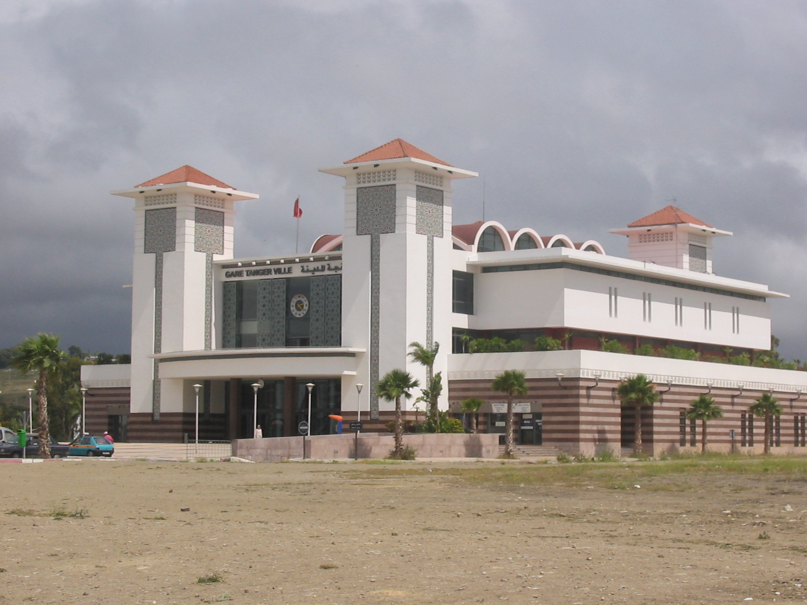 Gare ferroviaire de Tanger (Maroc). Je suis l'auteur du cliché pris en 2005